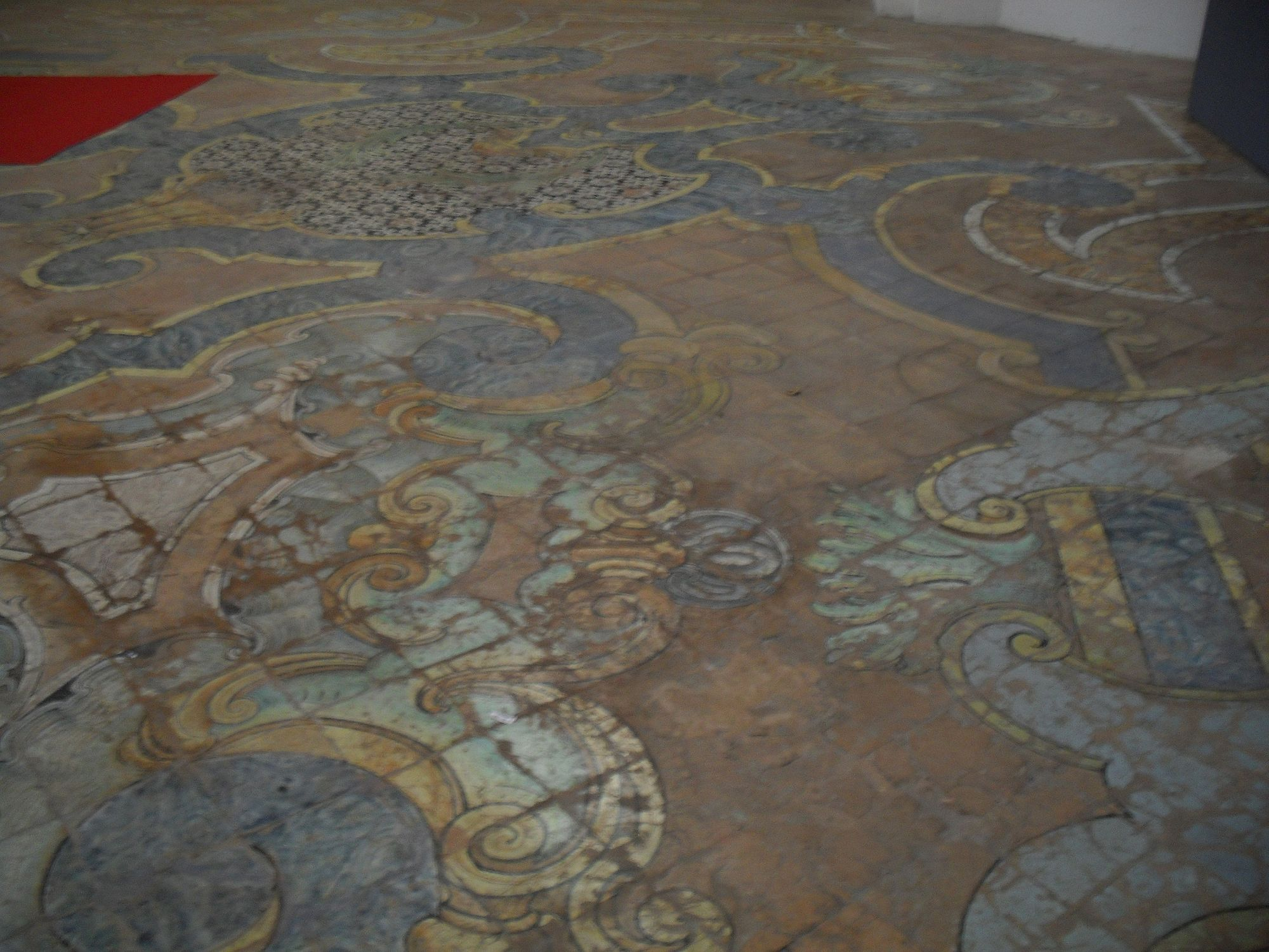 Pavimento Santa Maria della Pietrasanta (Napoli)